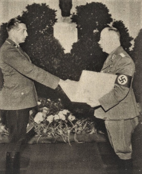 Josef Pfitzner (náměstek primátora, vpravo) a František Teuner (předseda Kuratoria), 1944